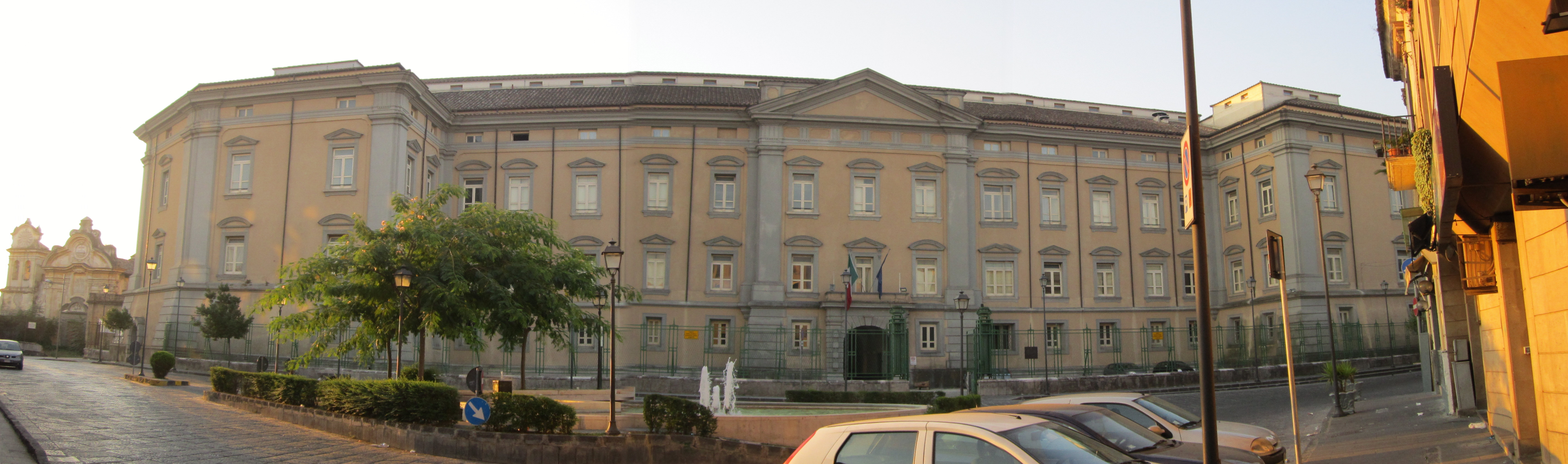 Opera propria